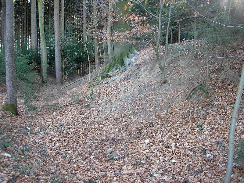 Hochmittelalterlicher Burgstall Haunswies (Gemeinde Affing, Landkreis Aichach-Friedberg, Bayerisch-Schwaben. Der Südostteil des Burgstalles. Eigene Aufnahme, Feb. 2008 / Former High Middle Ages Haunswies castle near Affing (Bavaria, Germany). The south eastern part of the castle. Own photo, Feb. 2008